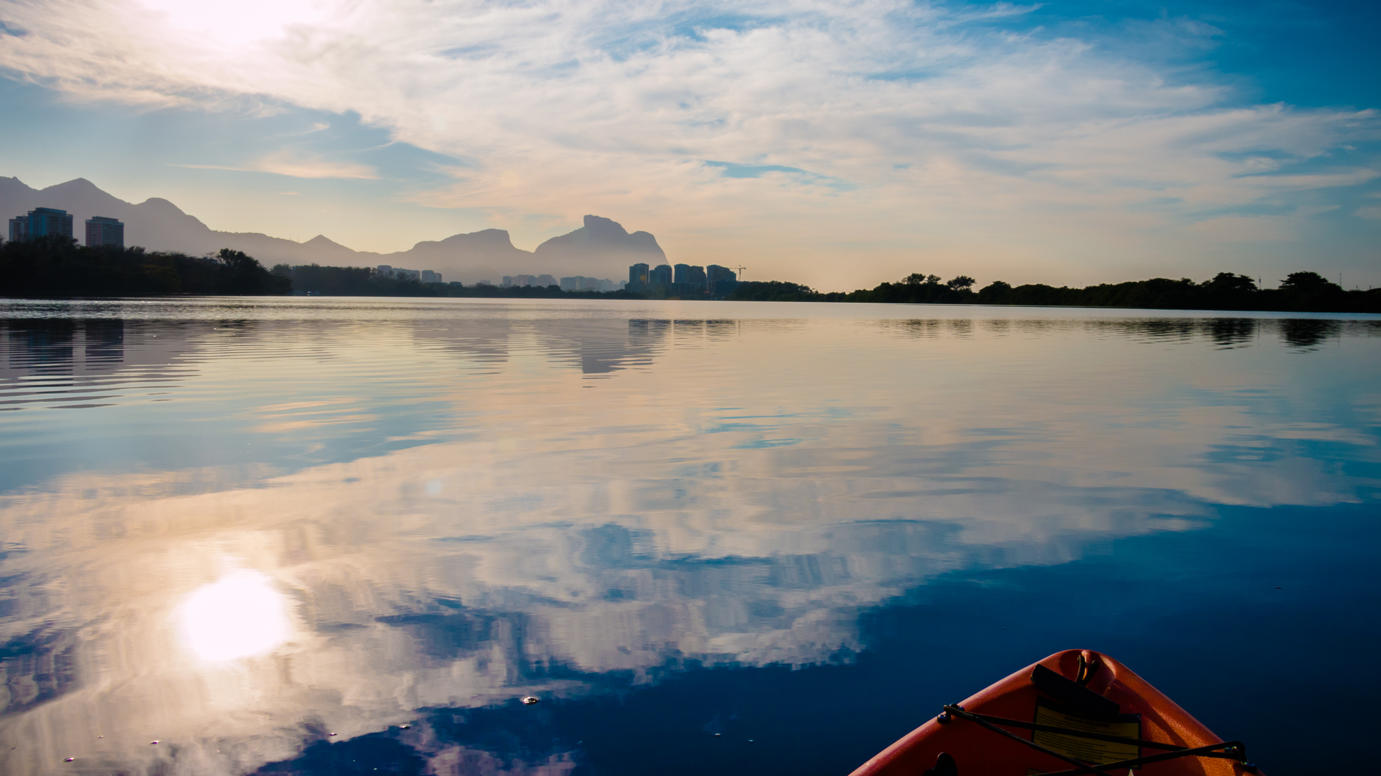 Lagoa na Reserva de Marapendi